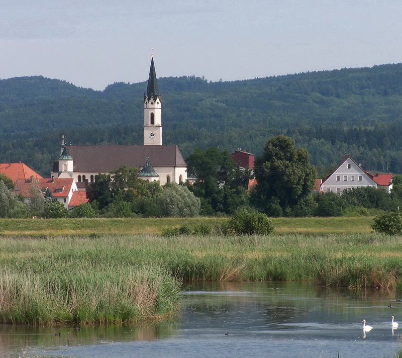 Kath. Pfarrkirche Mariä Himmelfahrt in Pondorf. Die Kirche wurde 1894 von einer einschiffigen Anlage zu einer dreischiffigen gotischen Basilika umgewandelt. Zu dem Ensemble gehört auch die Friedhofkapelle St. Katharina, die 1591 erbaut wurde.